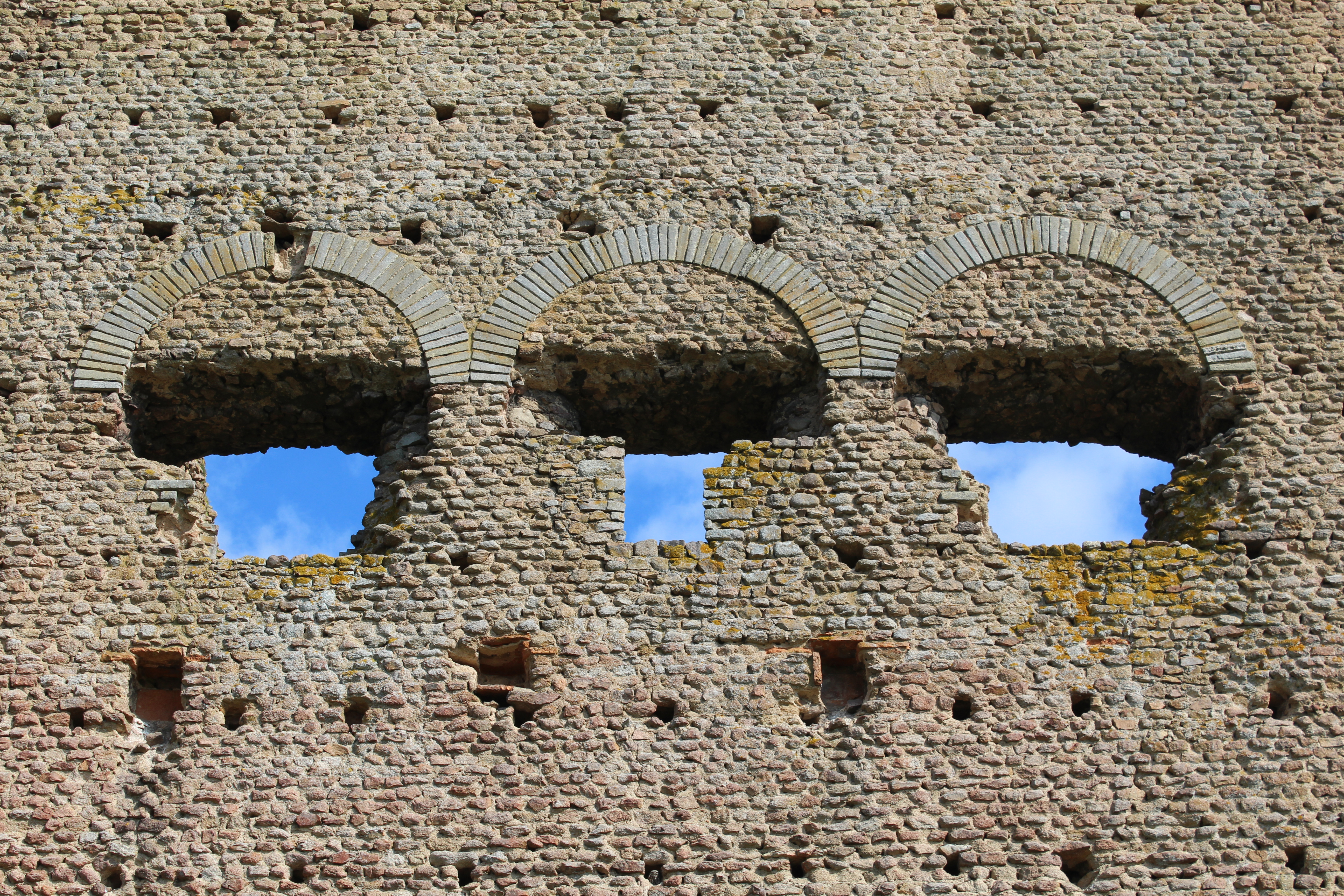 Temple de Janus, Autun.